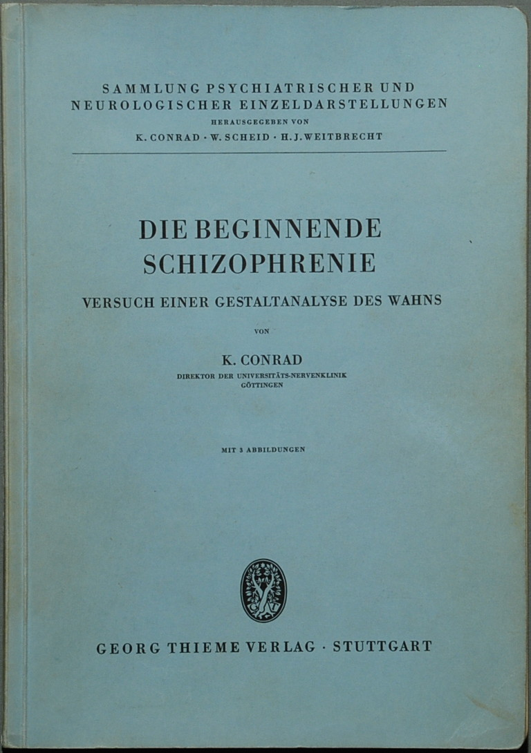 Conrad, K.: Die beginnende Schizophrenie. Versuch einer Gestaltanalyse des Wahns. Stuttgart: G. Thieme 1958,165 S.; Erstausgabe; Orig.-Broschur gr. 8°.